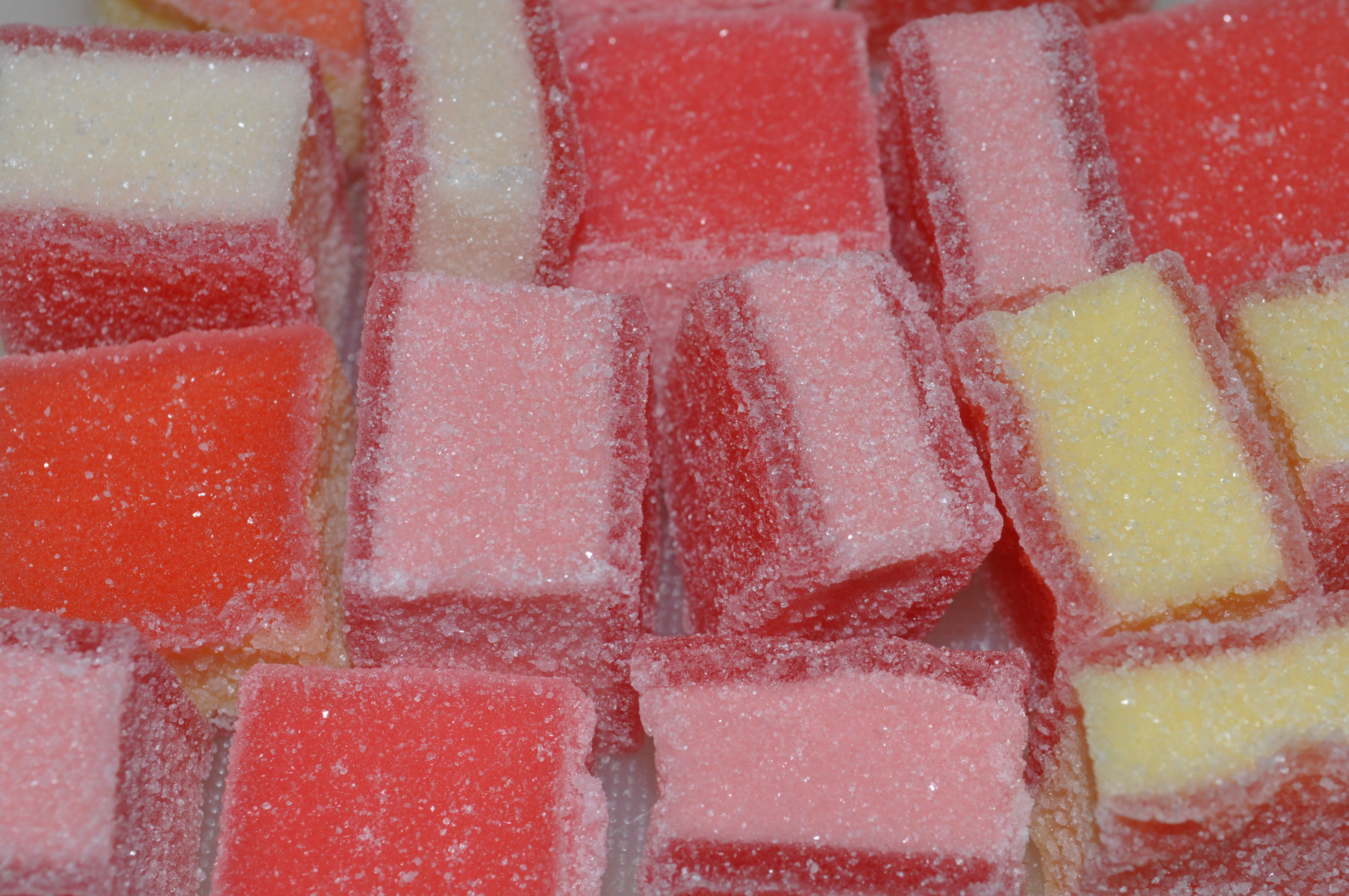 Hamburger Speck (Schaumzuckerware)